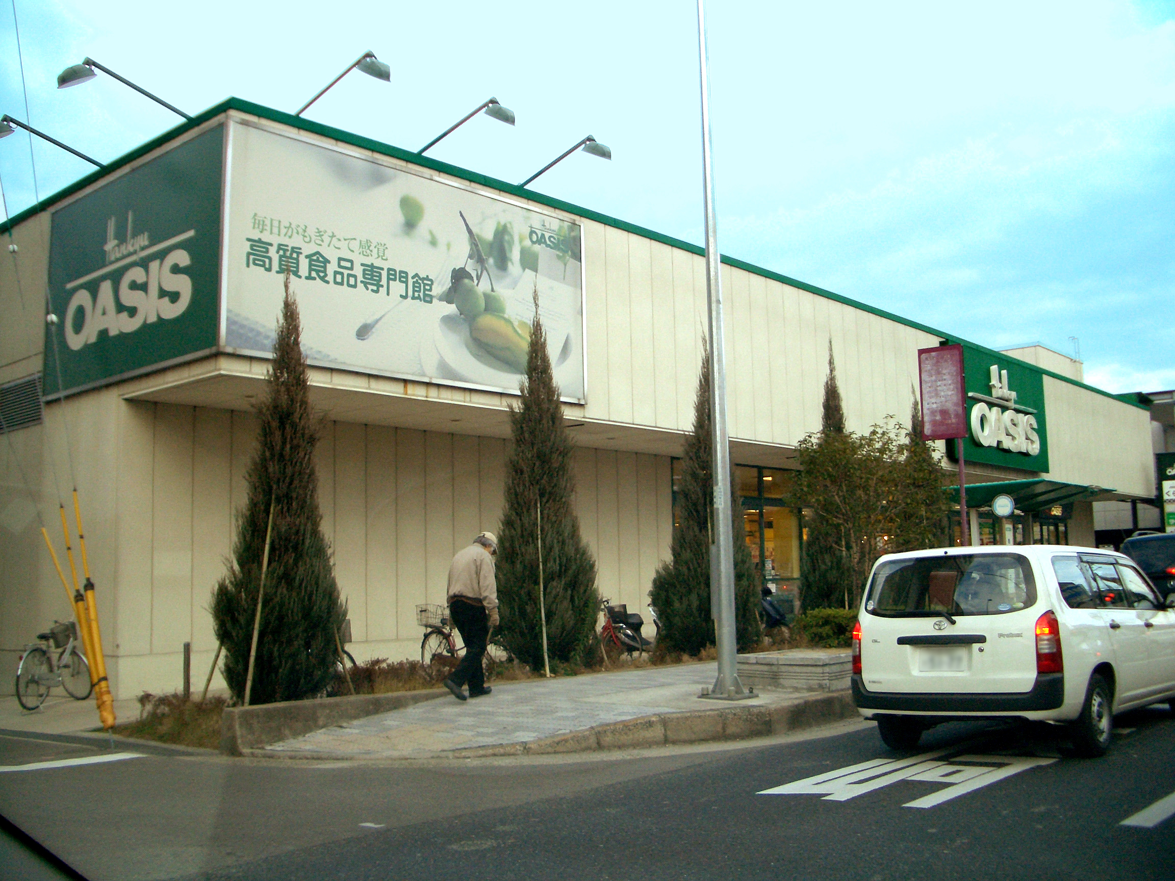 Hankyu OASIS Takarazuka,Tsurunoso Takarazuka-City Hyogo Japan.